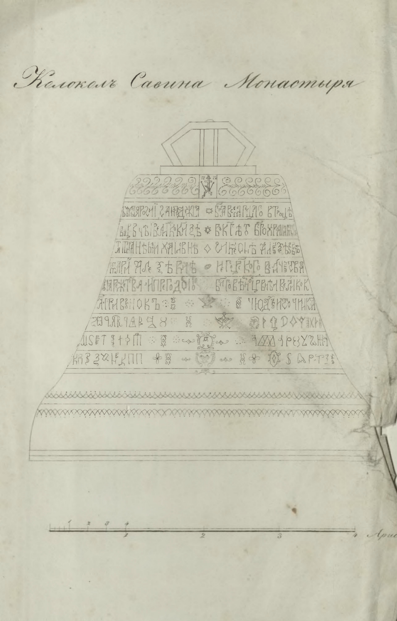 Чертеж колокола, 1883 год